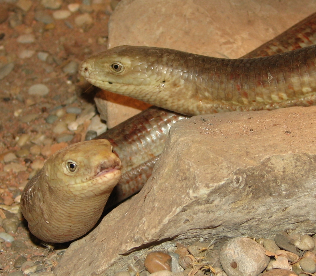 Sheltopusik (Ophisaurus apodus)